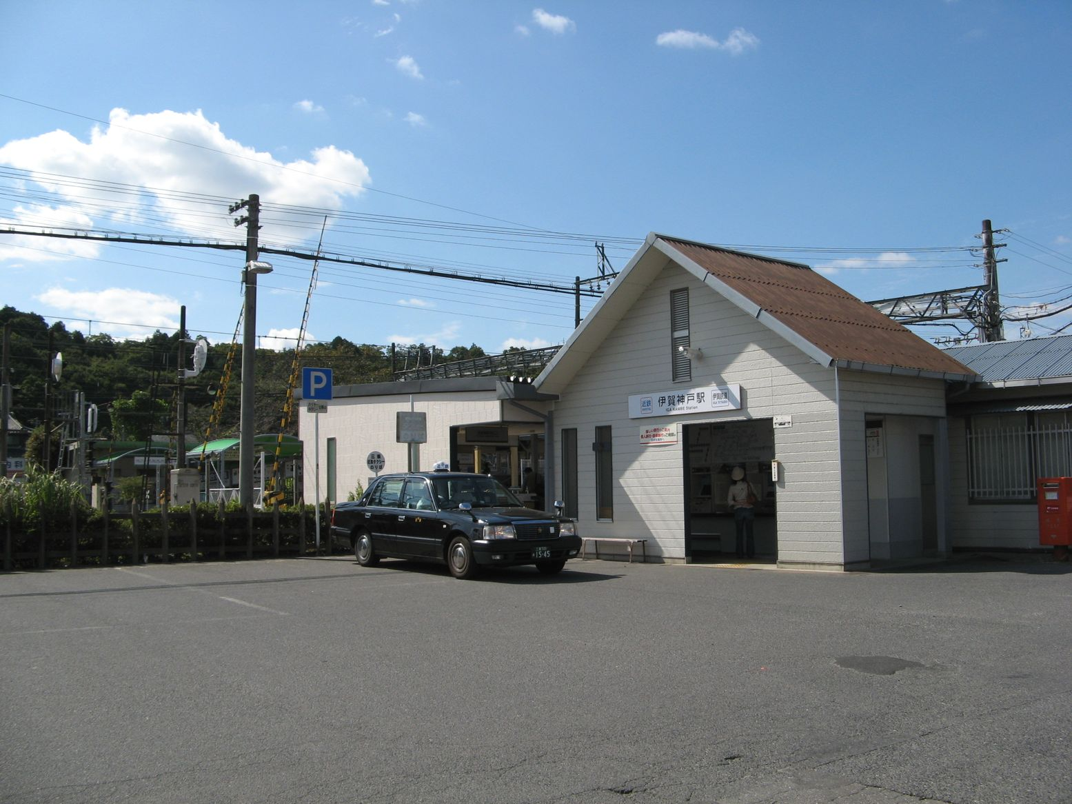 伊賀神戸駅